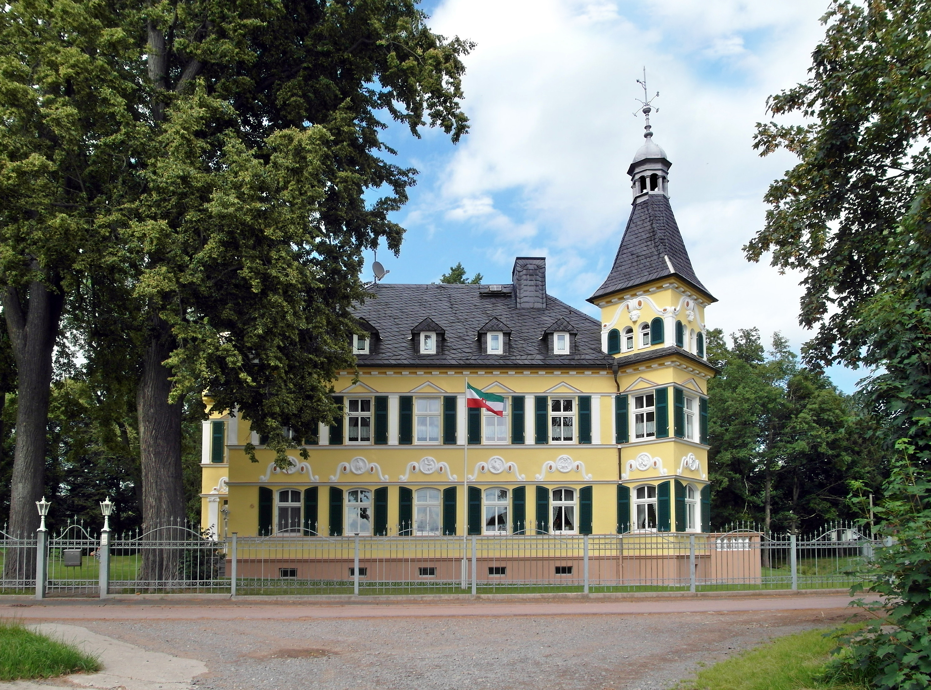 18.07.2016 09618 Gränitz (Brand-Erbisdorf) Hofberg (GMP: 50.805707,13.283118): Das Schloß Gränitz wurde vermutlich um 1890 erbaut und ab 1920 vom neuen Besitzer, dem Fabrikanten W. Kubisch, umgebaut. In der DDR war hier ein Kinderheim und ab 1966 die Schule. Nach der Wende in den 1990er Jahren an einen Unternehmer aus der Gegend verkauft, der das Herrenhaus liebevoll saniert hat. [SAM7180.JPG] 20160718910DR.JPG(c)Blobelt